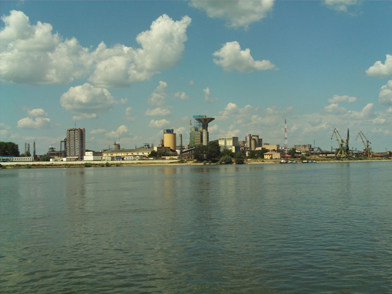 Portul Turnu Măgurele